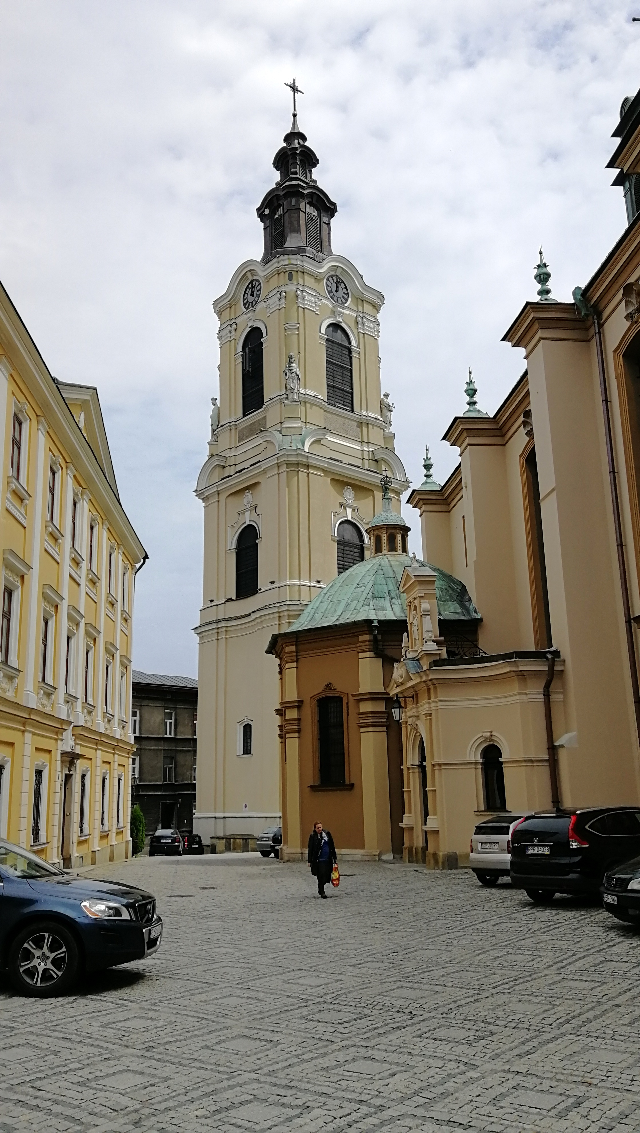 Arcikatedrála Nanebevzetí Panny Marie a sv. Jana Křtitele, Přemyšl